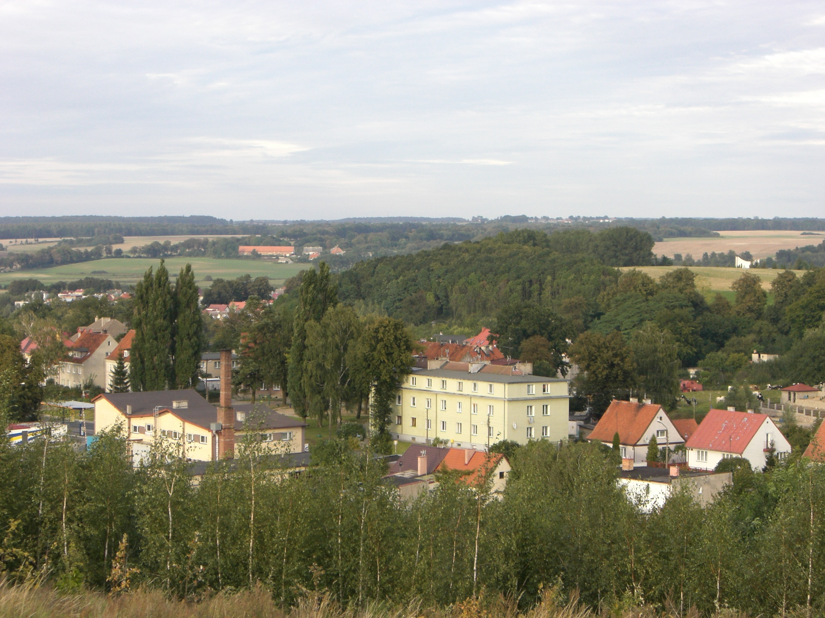 widok na Dzierzgoń od południa